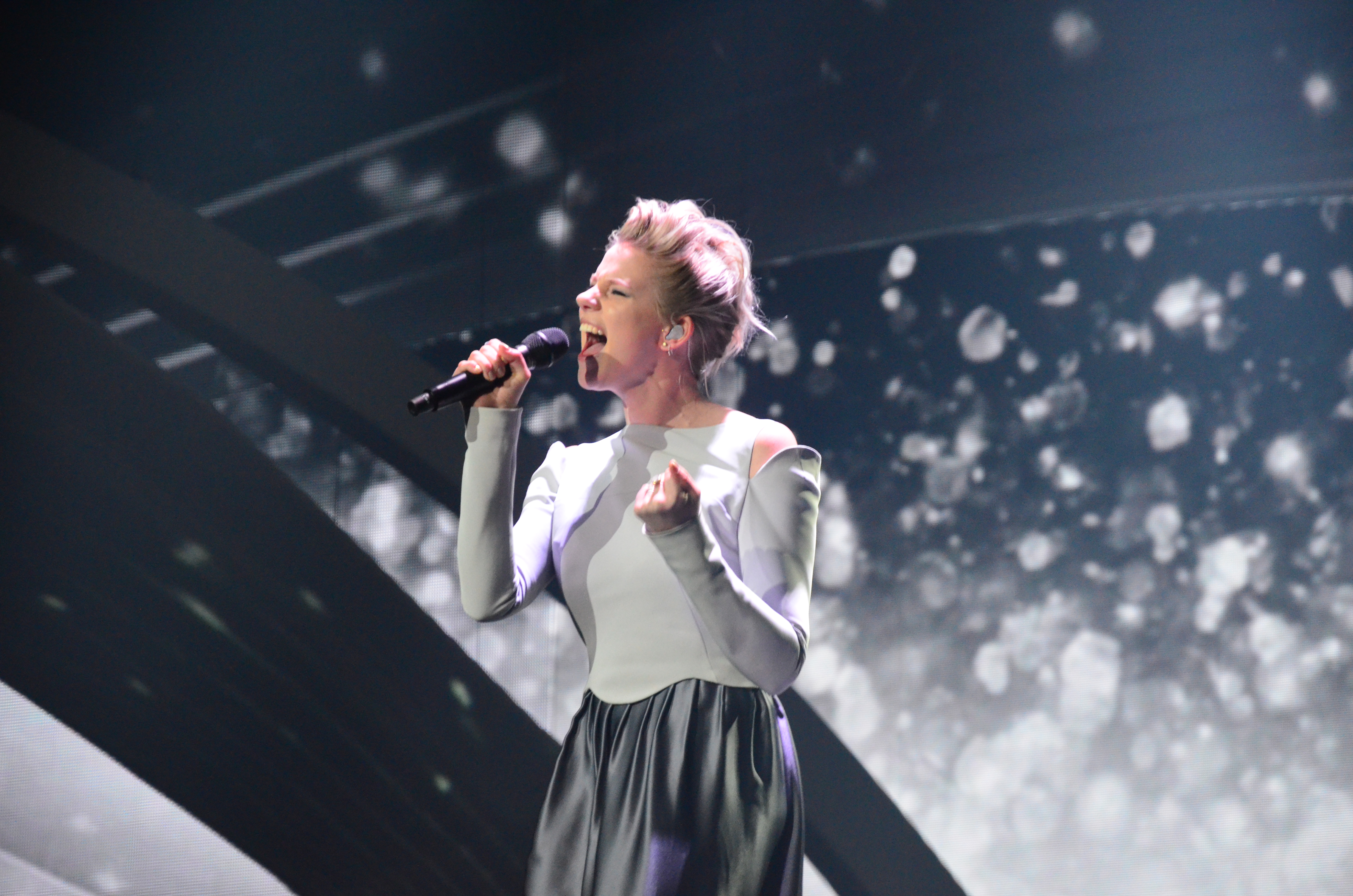 10 травня 2017 року у Києві відбулась генеральна репетиція 2 півфіналу "Євробачення".